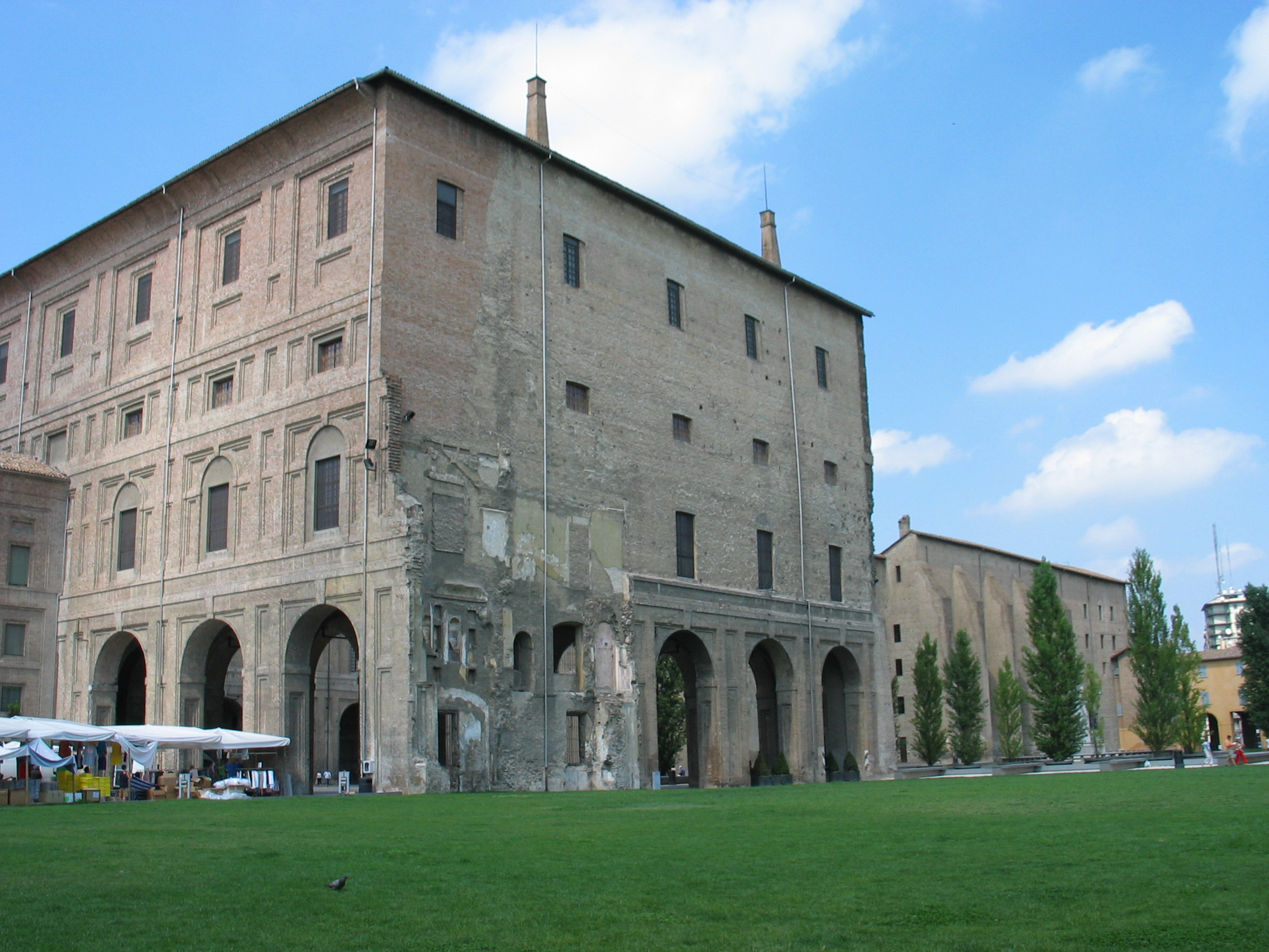 La Pilotta à Parme